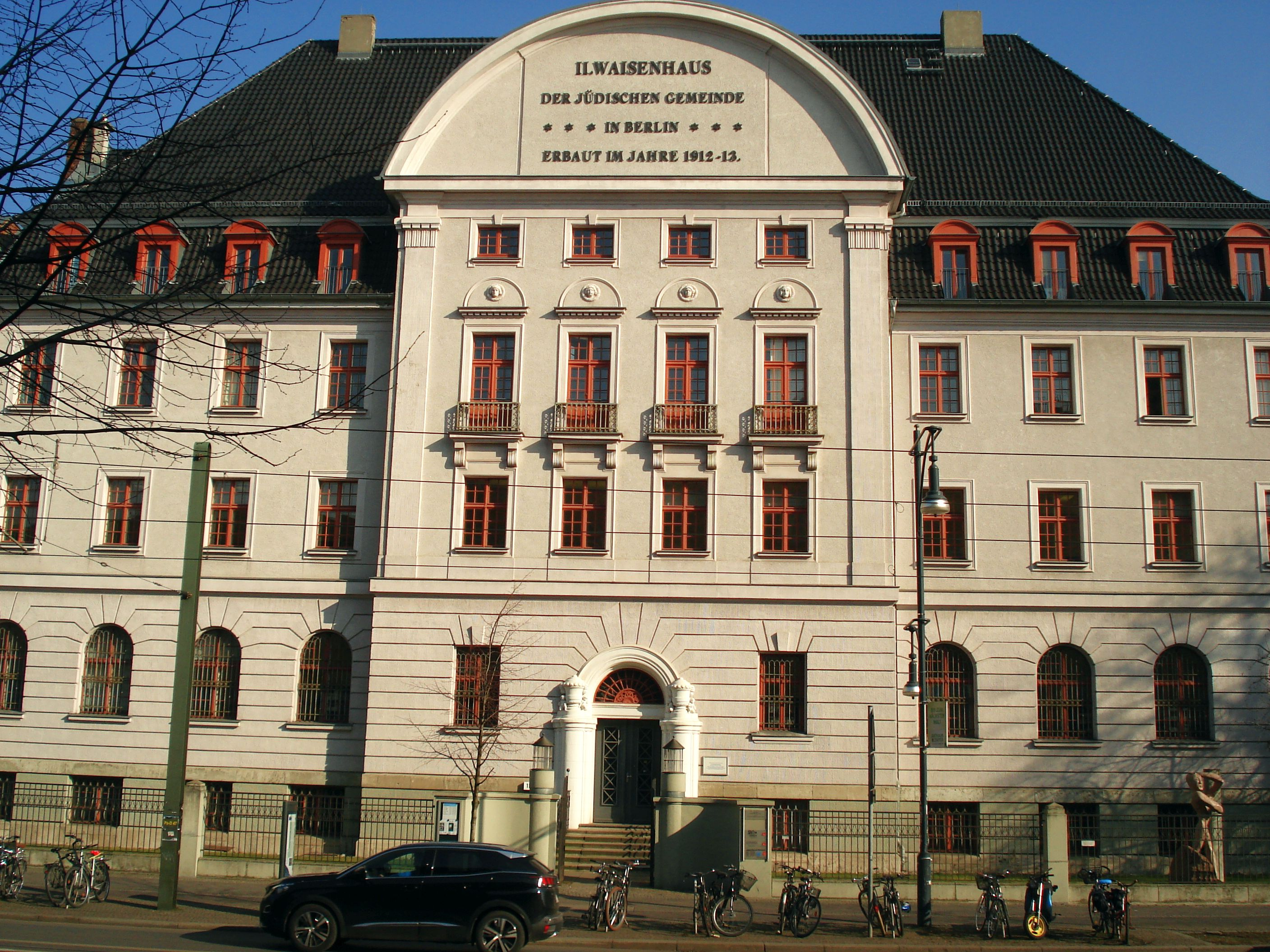 Waisenhaus der Jüdischen Gemeinde in Berlin (1912-13), heute Stadtteilbibliothek Janusz Korczak in Pankow